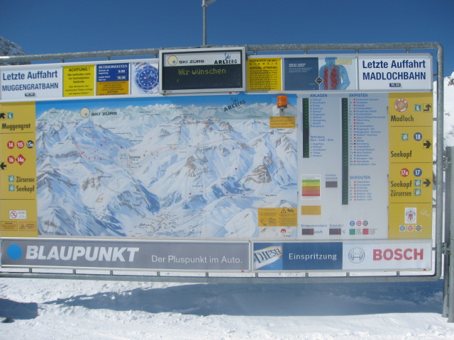 Panoramatafel am Kopf der Seekopfbahn in Zürs am Arlberg